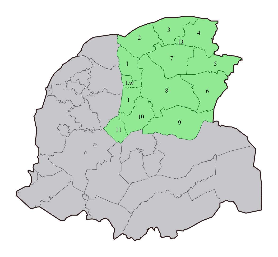 Gritenijen in Eastergoa oan ein 17e ieu Nedersaksies: Grieteni'jen in Oostergo an et aende van de 17e ieuw